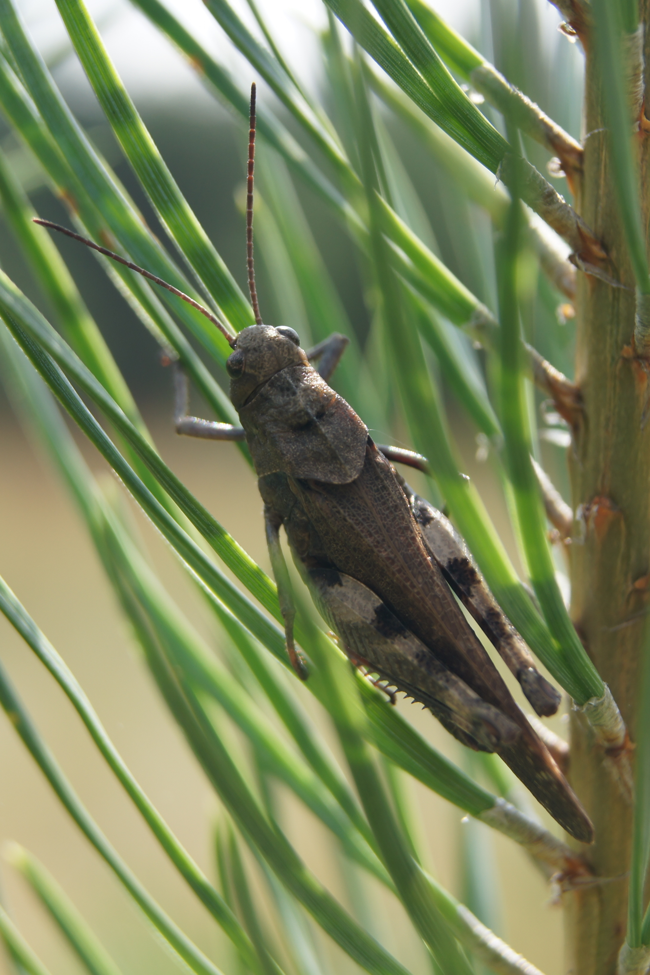 Raudonsparnis tarkšlys (Psophus stridulus) tupi jaunoje pušaitėje